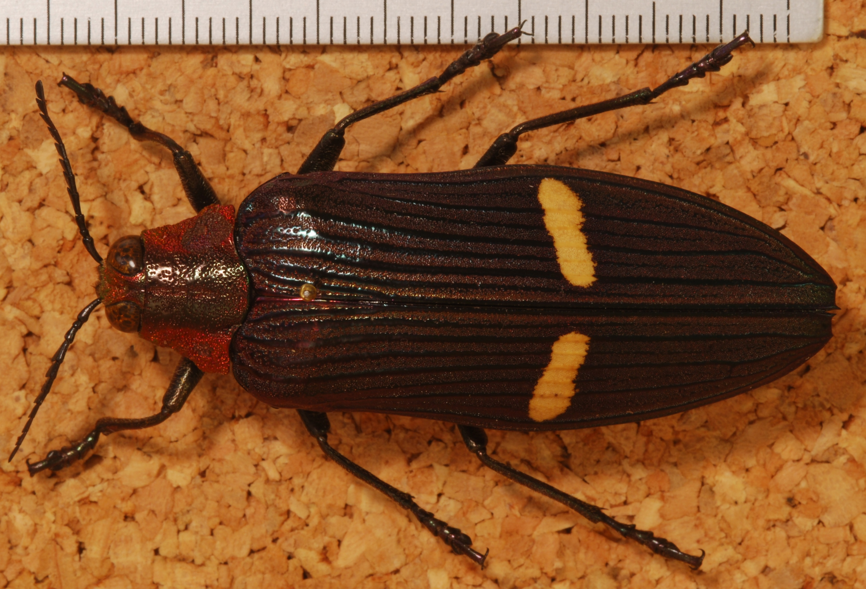 Ban Phatang, LAOS